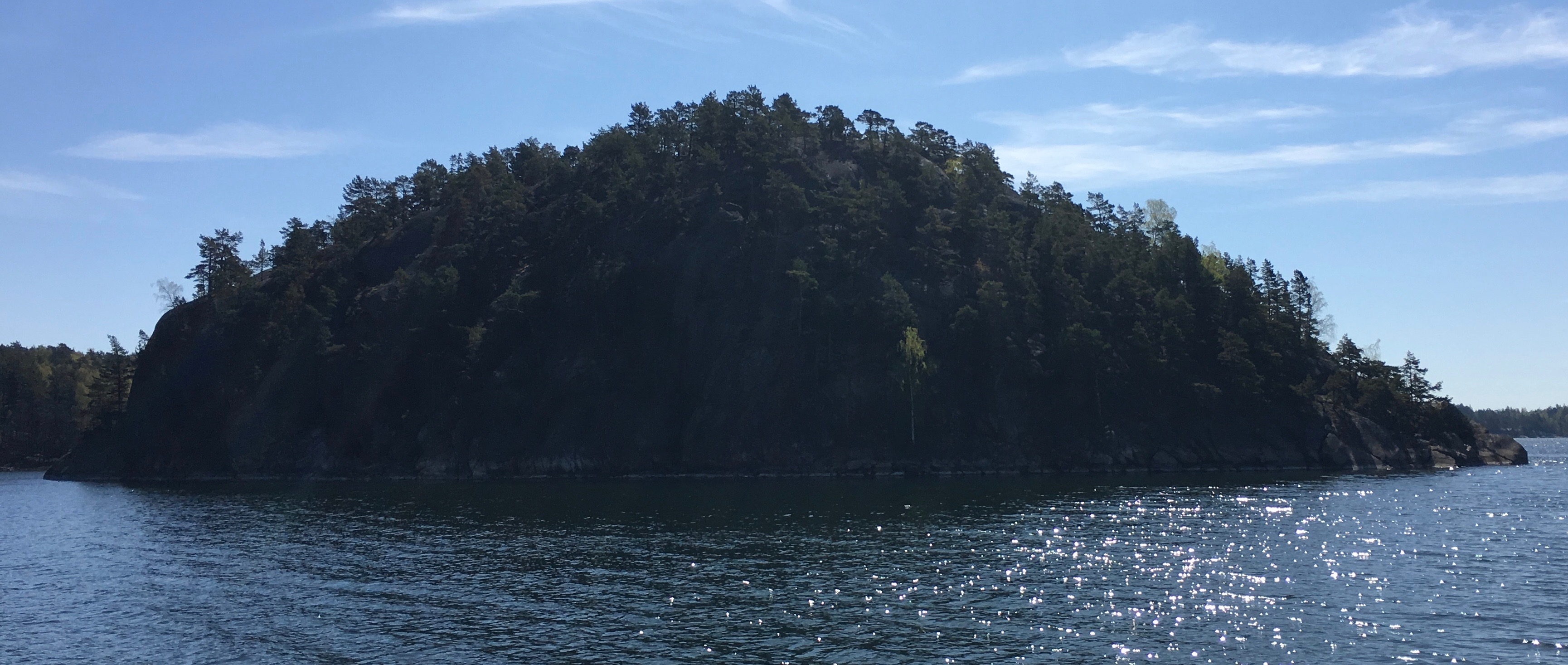 Bårnholmin linnasaari Nauvossa